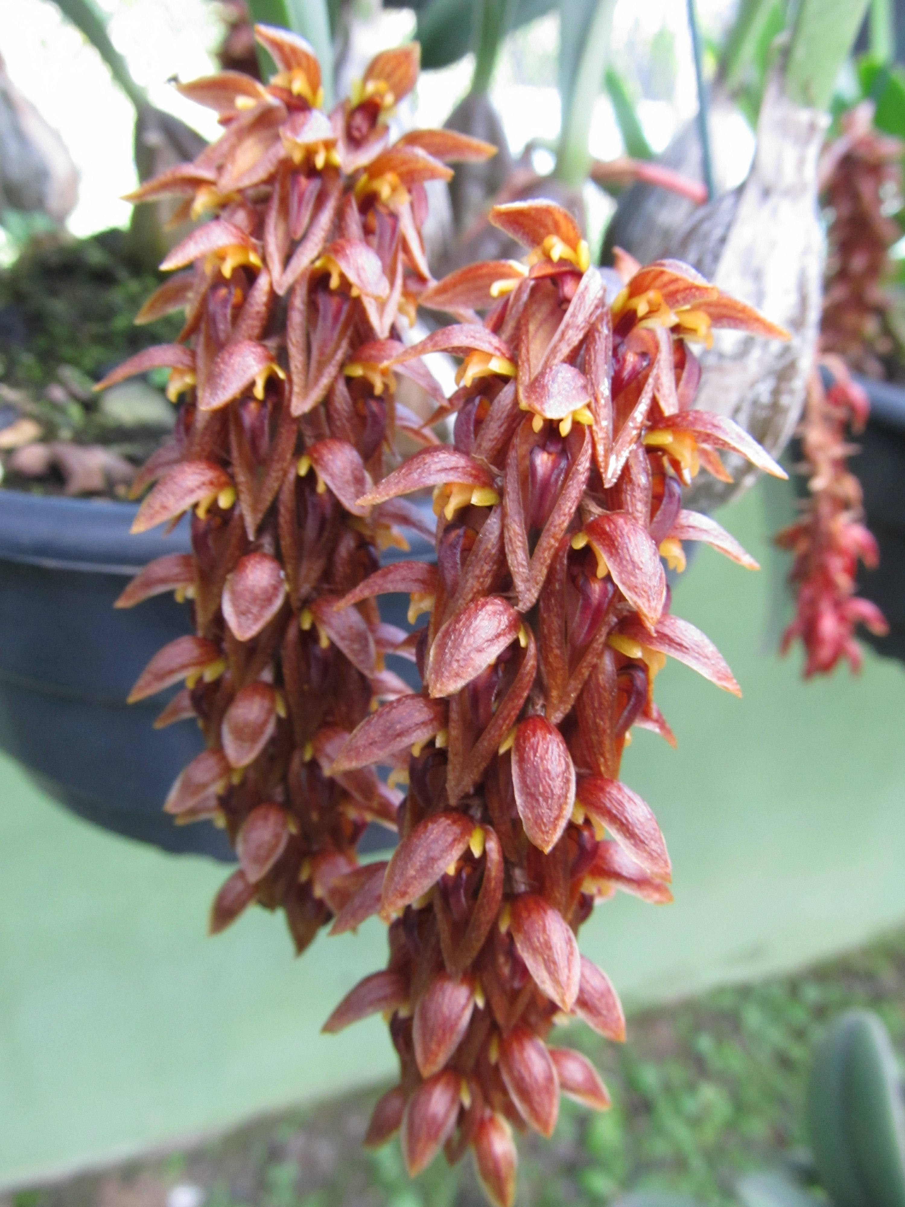 Photo taken by Christian Demetrio & Dalton Holland Baptista, 8/March/2013